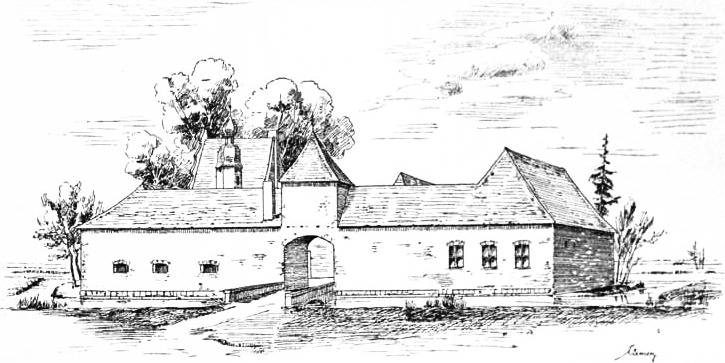 Zeichnung des Hauses Holtheyde in Wachtendonk